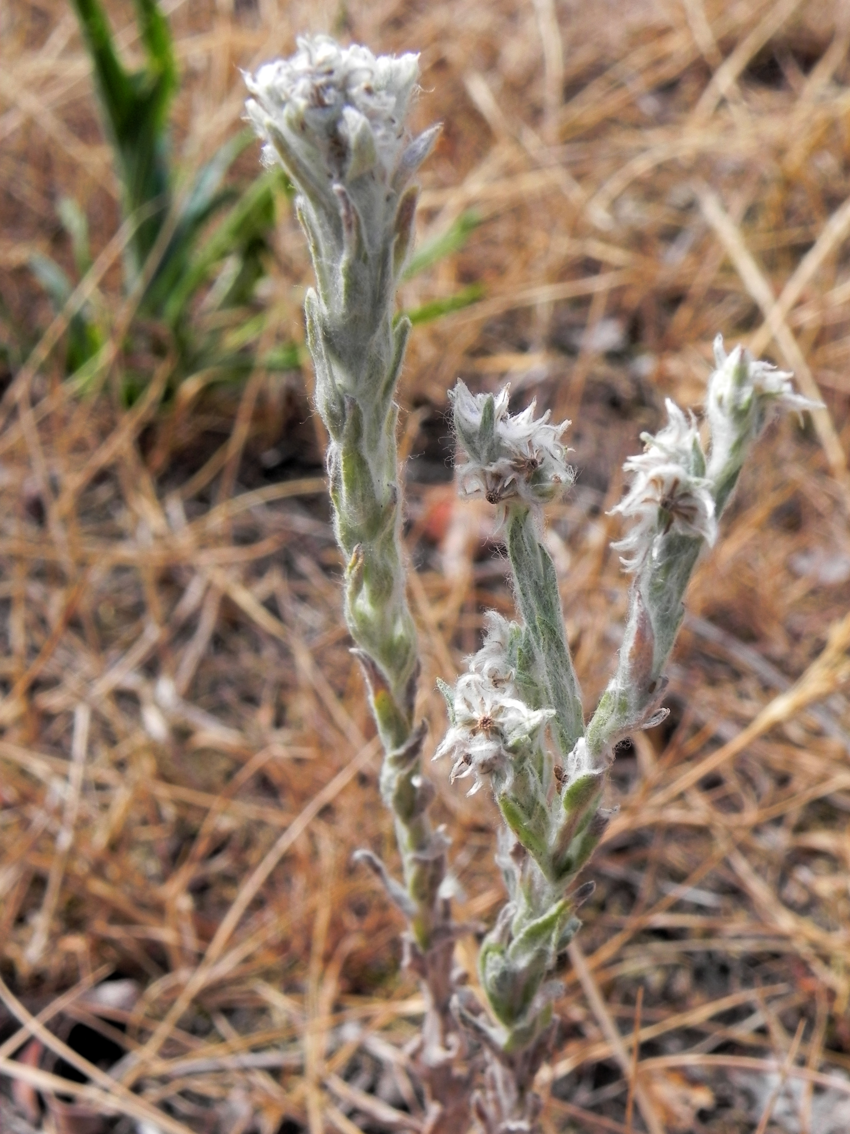 Acker-Filzkraut (Filago arvensis) in der Südheide (Germany)